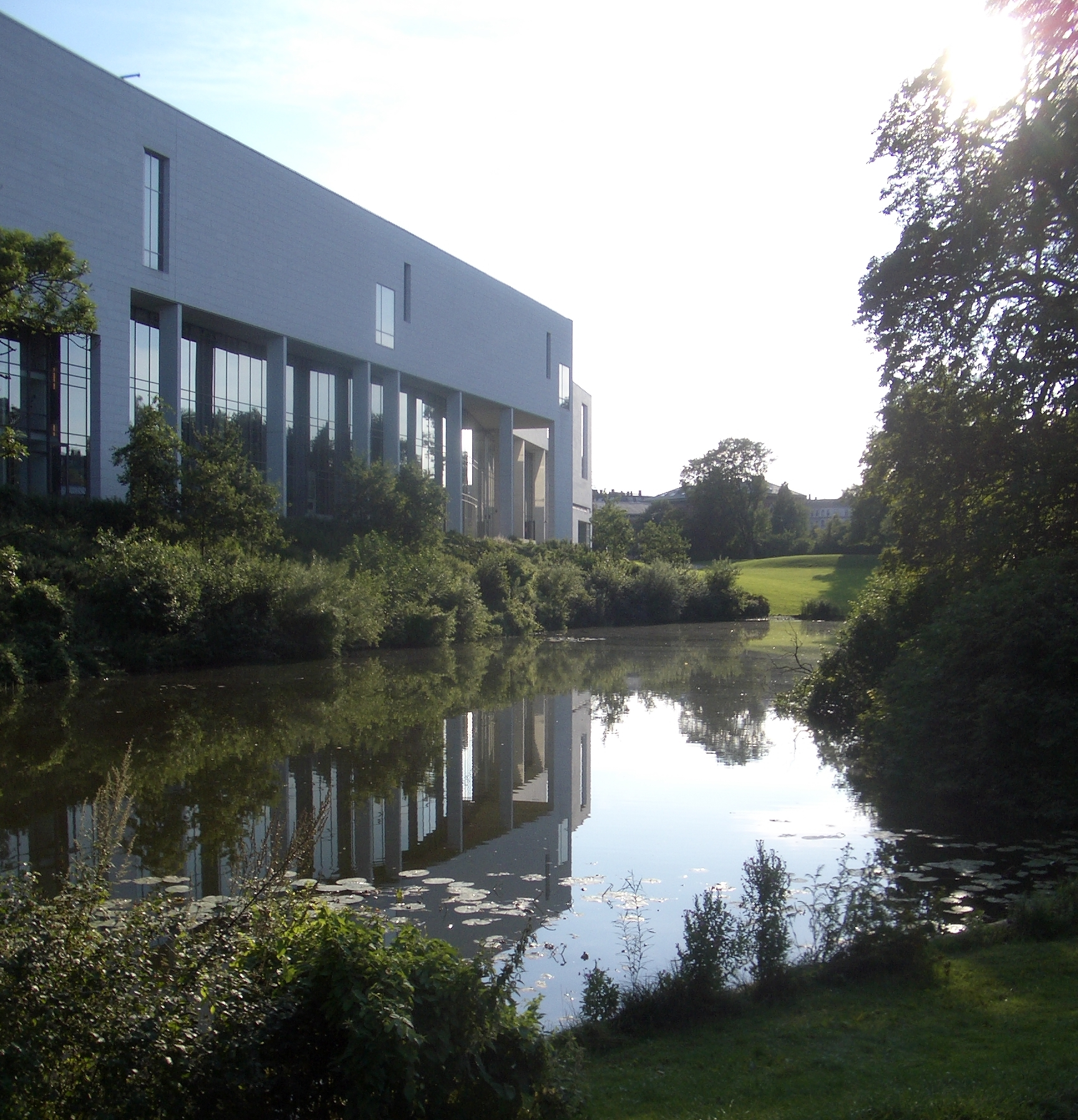 Østre Anlæg and Statens Museum for Kunst, Copenhagen, Denmark